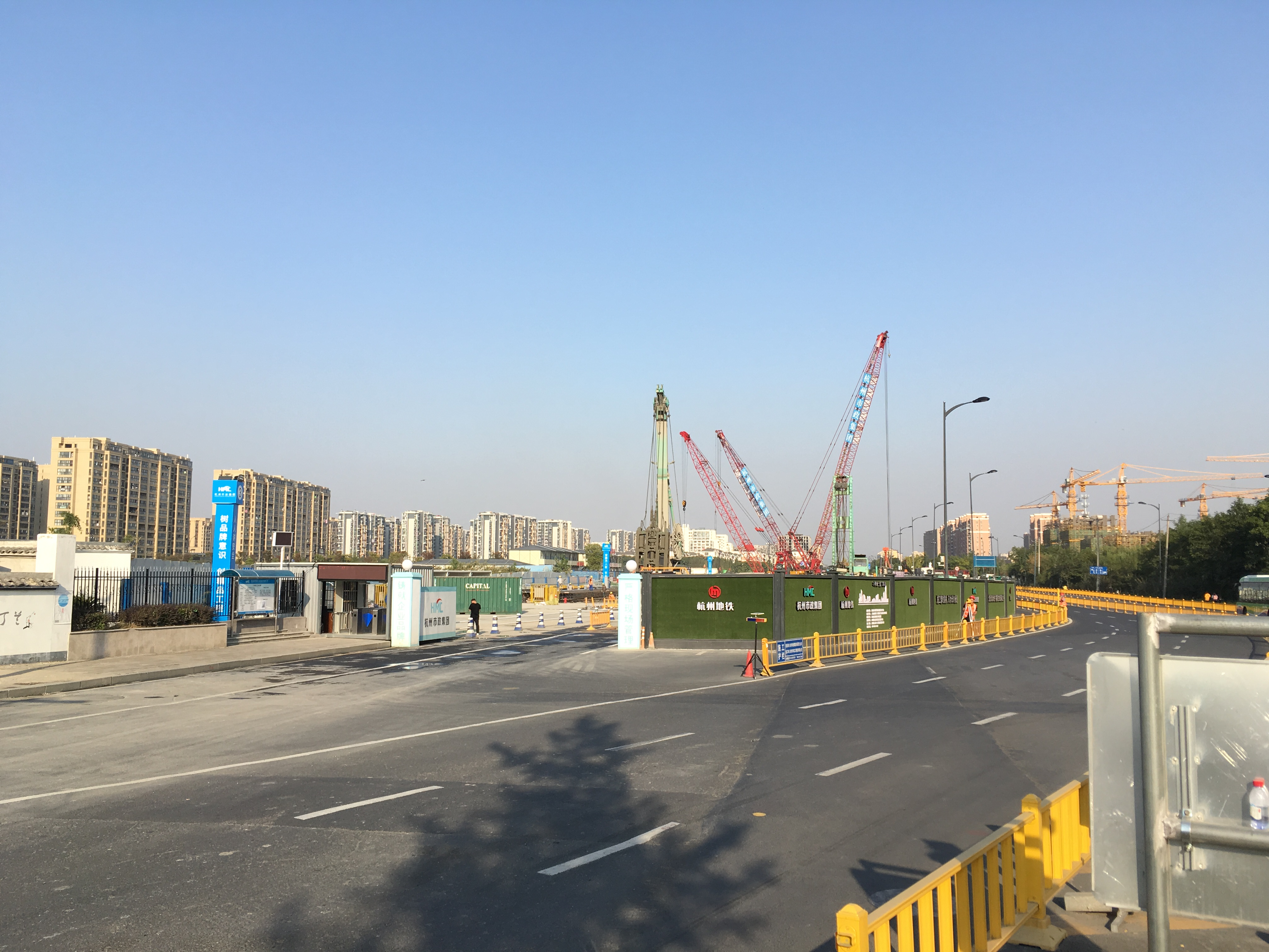 20181027笕丁路站工地